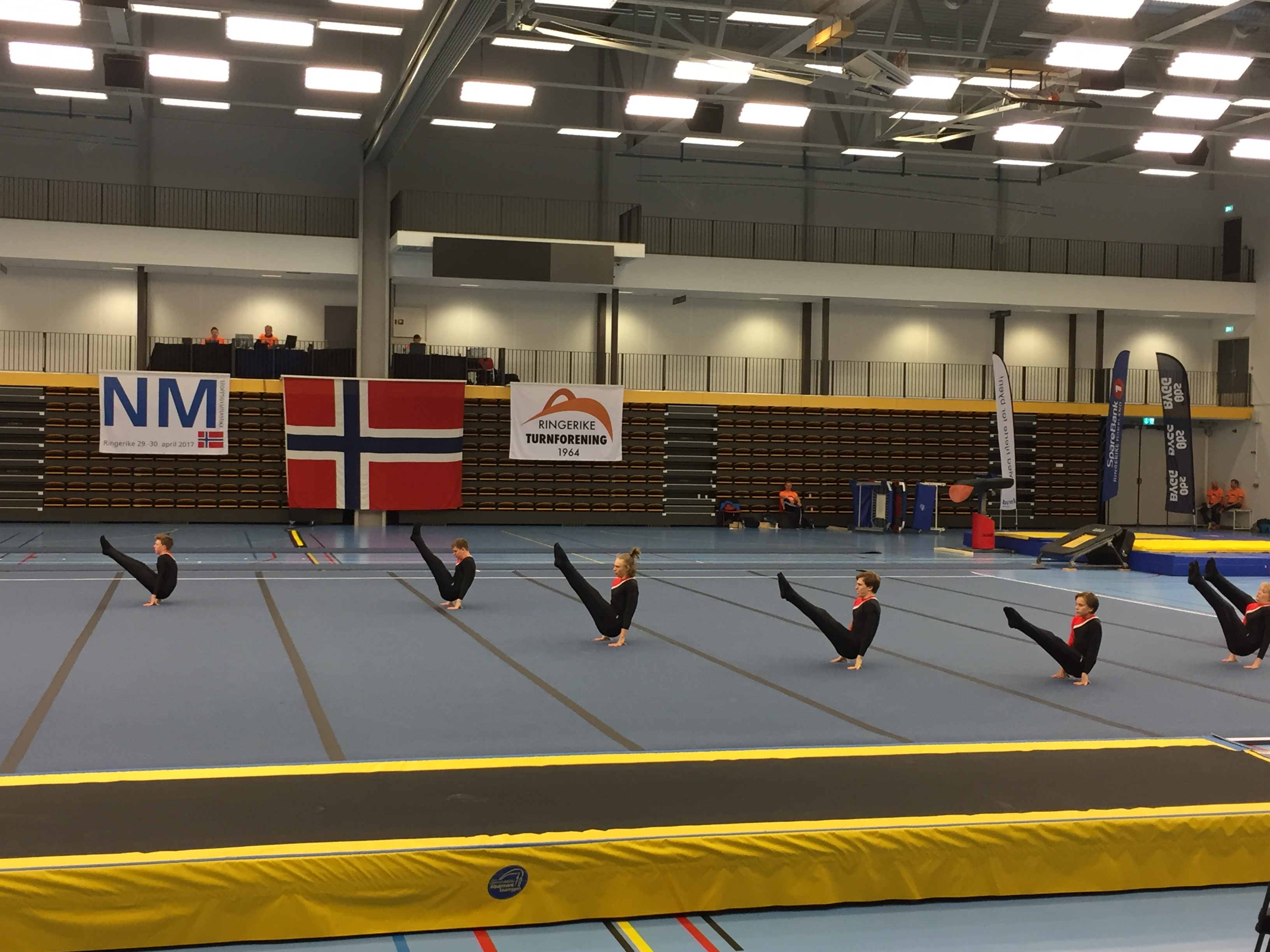 Junior-NM troppsturn 2017 Ringerike - Holmen - herrer frittstående